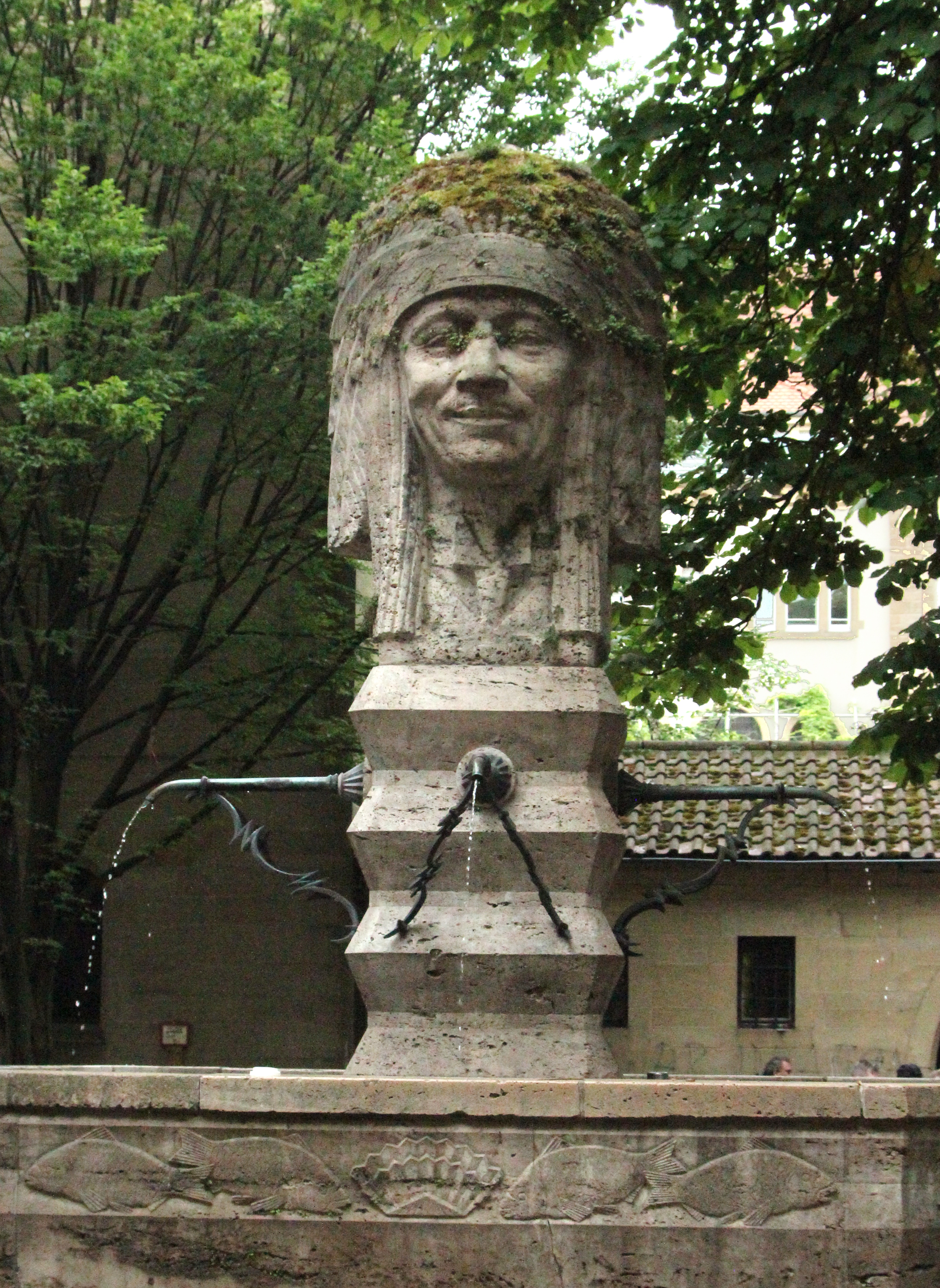 Bildinhalt: Der Indianerbrunnen auf dem Werderplatz in Karlsruhe Aufnahmeort: Karlsruhe, Deutschland